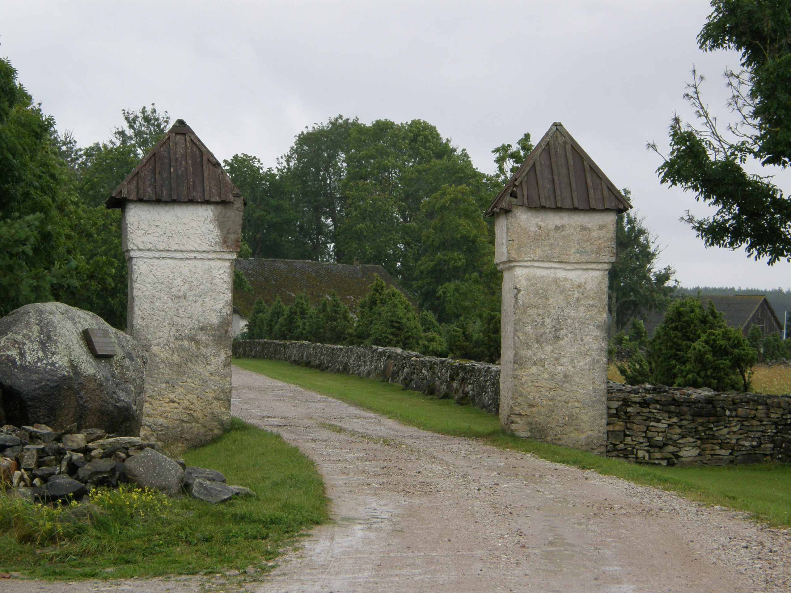 Pilguse mõisa väravad.